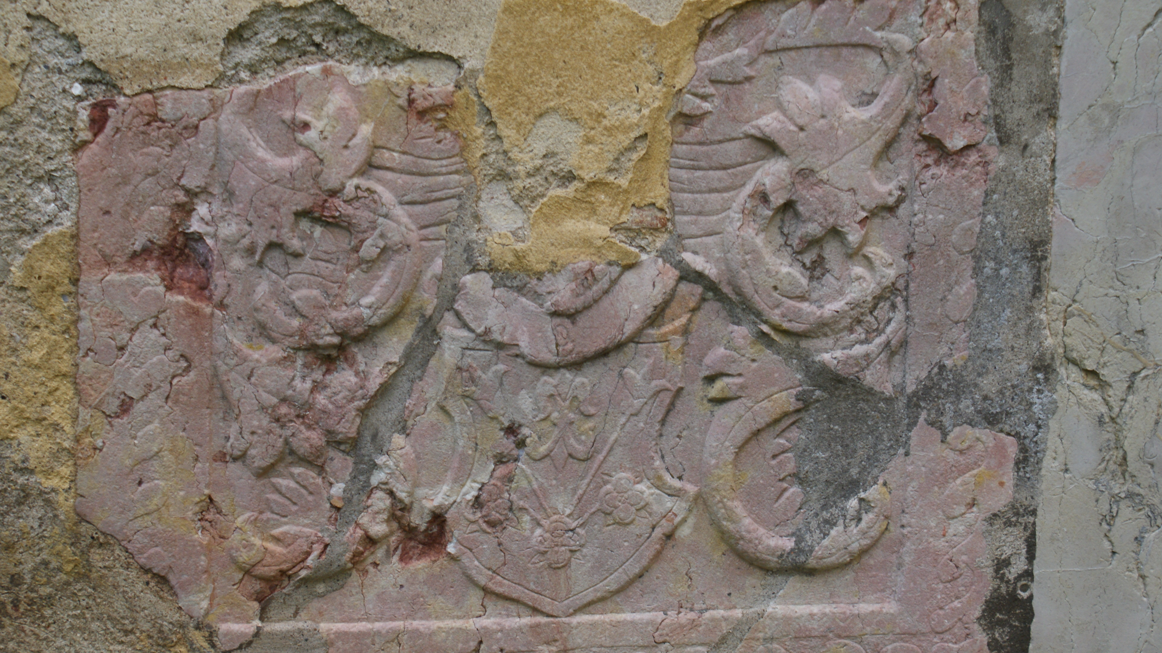 Liteň, kostel sv. Petra a Pavla, náhrobek v severní straně lodi.